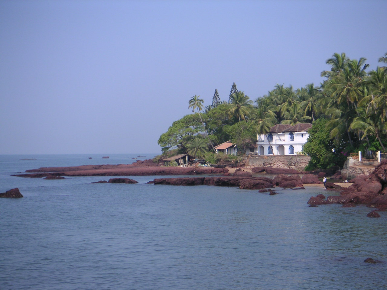 Goa.